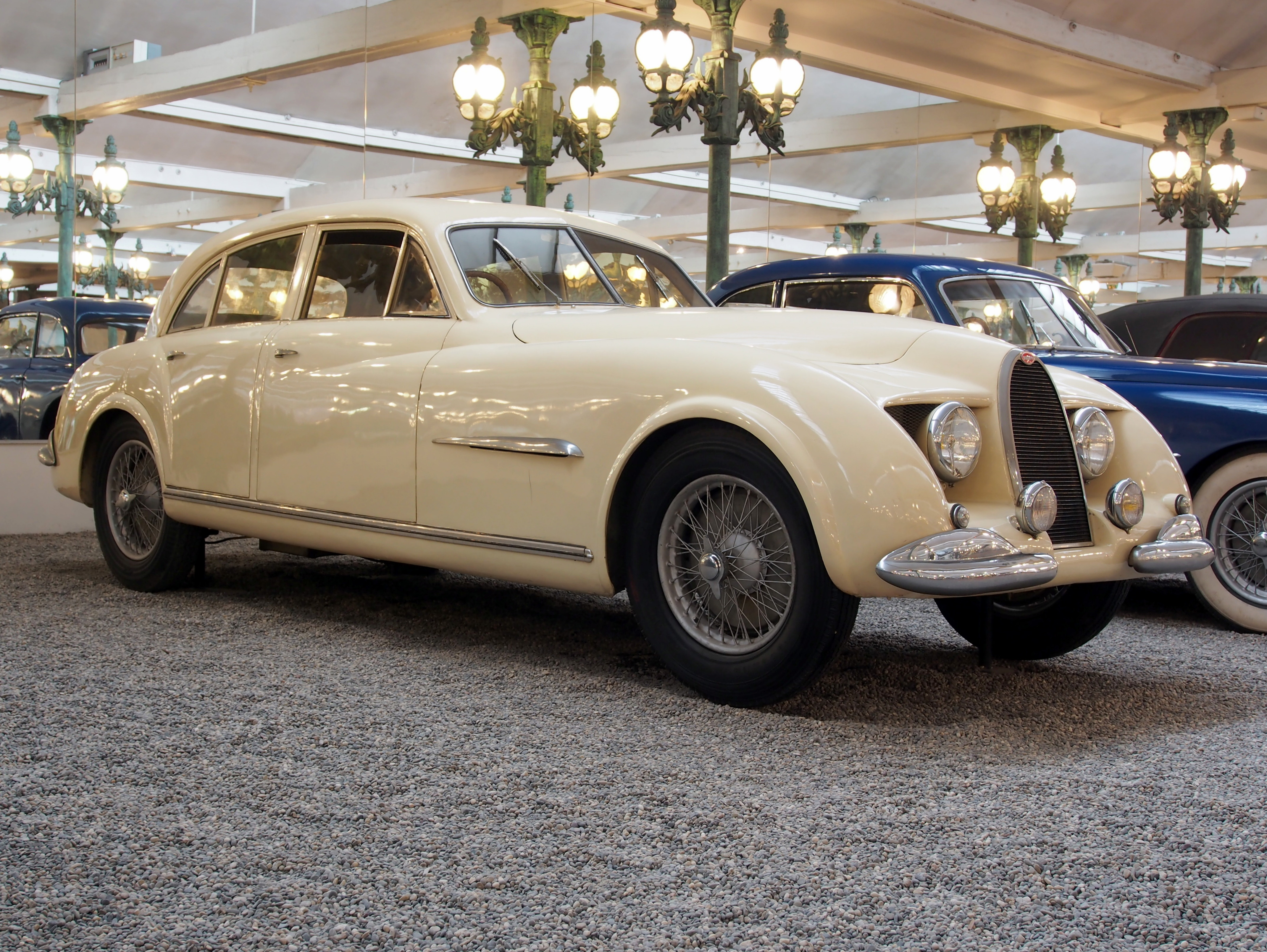 Photographed at the Cité de l’Automobile, Musée national de l’automobile, Collection Schlumpf, Mulhouse, France.